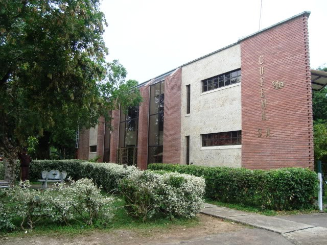 Sede administrativa de Cofema en Florencia (Caquetá).